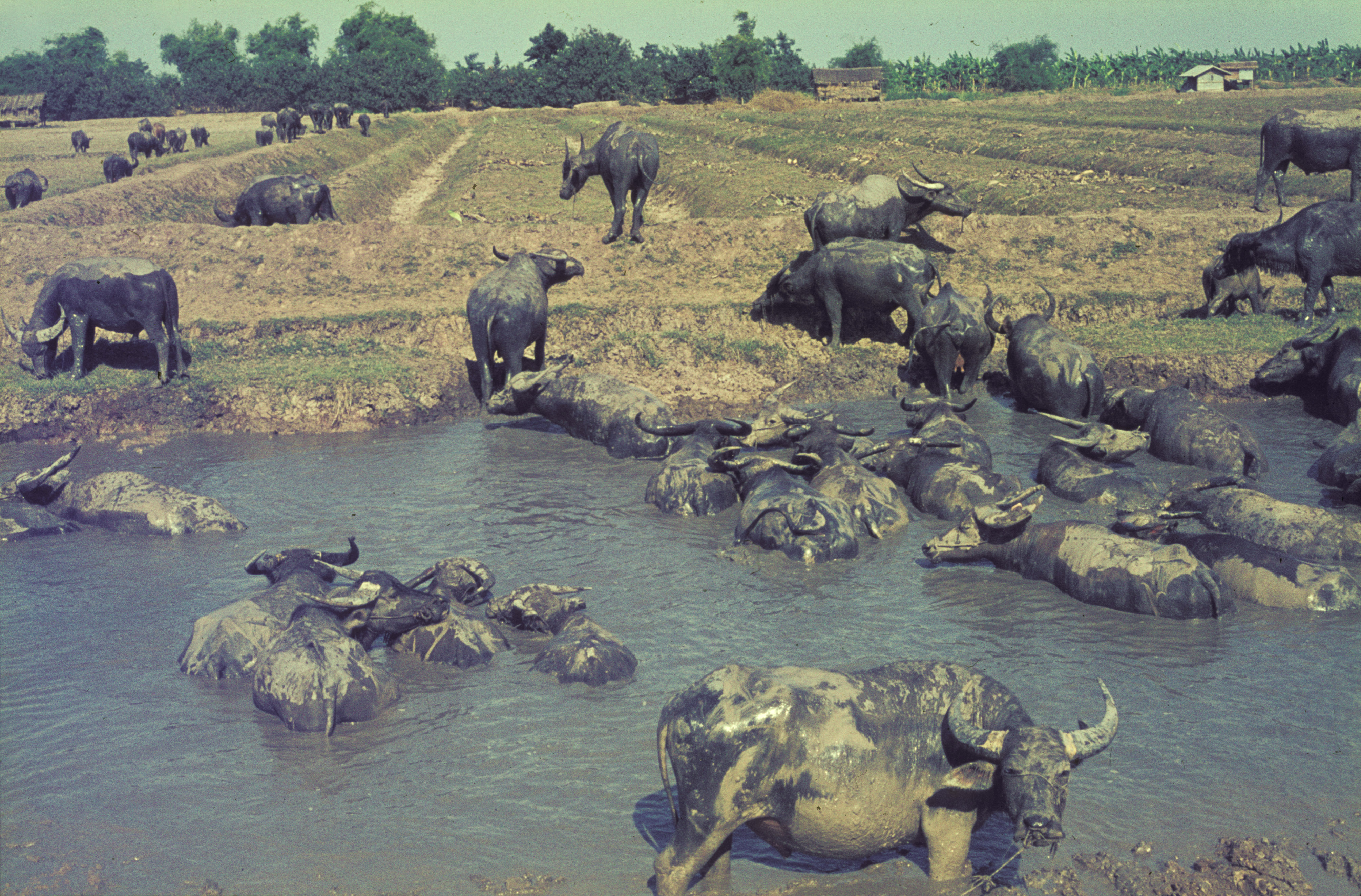 Bangkok, Thailand